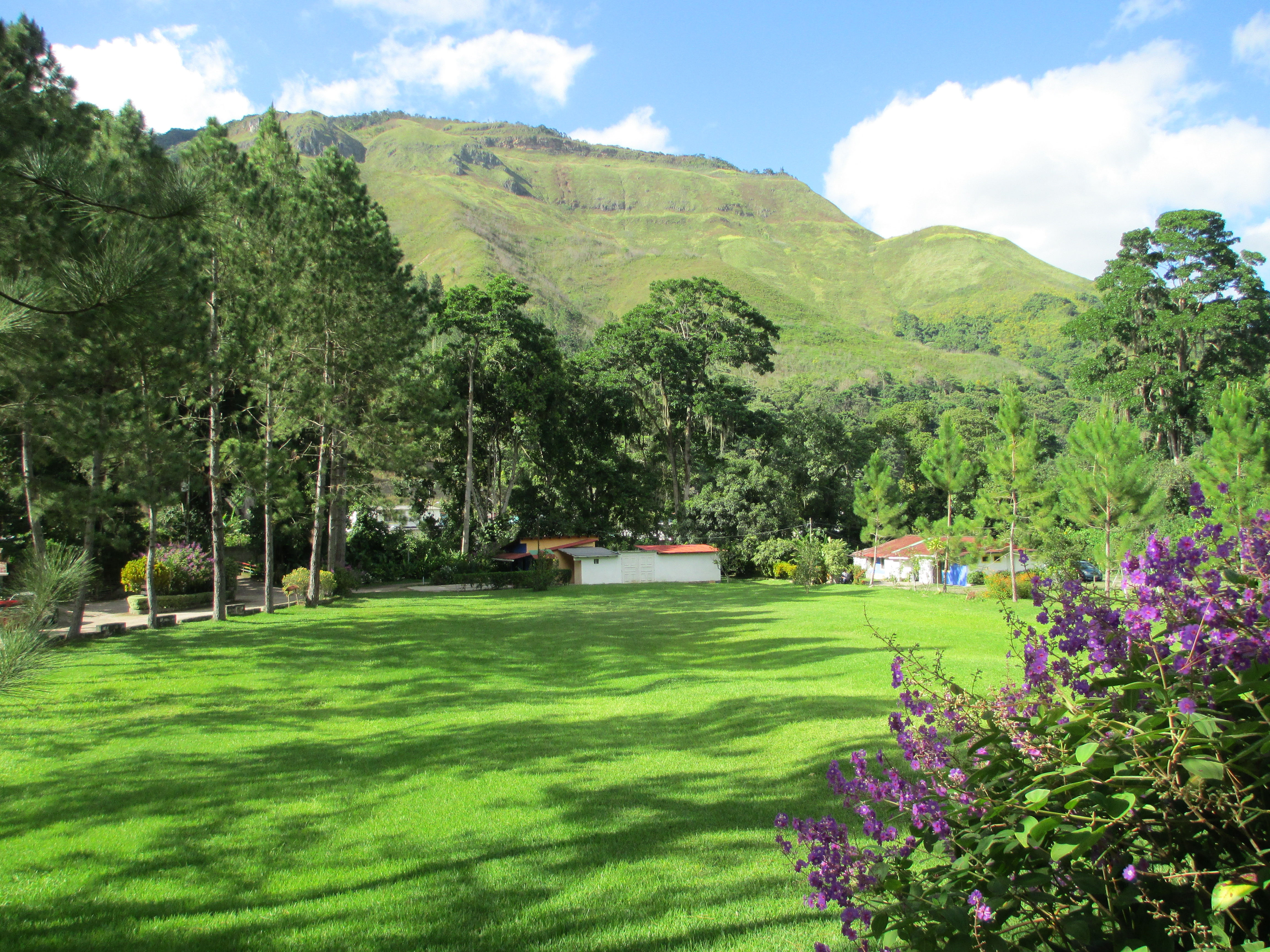 Paisaje Caripe - Monagas